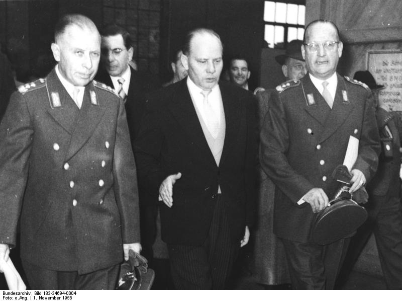 Note: This description has been identified as biased or incorrect: GDR propaganda language. ADN-ZB, 1.12.1955 Sie sind wieder da-die eingefleischten Militaristen An der Spitze derjenigen, die durch Adenauers Kriegsminister Blank ihre Ernennungsurkunde als Offiziere und Spieße für die NATO-Söldner-Division Bonns erhielten, stehen zwei alte eingefleischte Militaristen Heusinger und Speidel. Heusinger-einst Fahnenjunker in der kaiserlichen Armee und später Angehöriger der Reichswehr hatte von 1937 bis 1944 dem Generalstab der Hitlerarmee angehört und als Chef der Operativen Abteilung die Pläne für die Überfälle auf Deutschlands Nachbarvölker, speziell auf die UdSSR, mit ausgearbeitet. Gleiche Verbrechen plant er heute, so schrieb er am 10.10.1953 in den "Bonner Heften" "...angreifen, wo immer eine Chance sich dafür bietet. Mit dieser Kampfmethode sollte der Westen dem Osten gegenübertreten..." Kriegsverbrecher Speidel gilt bei den NATO-Strategen als der Frankreich -"Spezialist". Als Gehilfe des Nazimilitärattaches in der Pariser Botschaft half er mit, im französischen Offizierskorps die fünfte Kolonnezu organisieren. Später war er Generalstabschef der VIII. Italienischen Armee an der Stalingradfront, wo unter seinem Kommando die italienischen Söldner rücksichtslos in den Tod getrieben wurden. Bei seinem Rückzug demonstrierte er die Taktik der "verbrannten Erde". Mit diesen beiden Militaristen beabsichtigen die Bonner Revanchepolitiker, die Politik des "kalten Krieges" in einen heißen umzuwandeln. UBz: Von links nach rechts: Heusinger, Blank und Speidel.